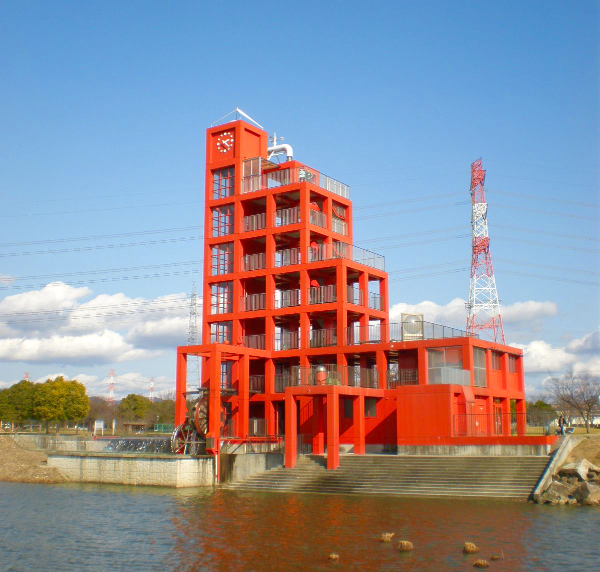 愛知県春日井市にある落合公園・水の塔（フォーリー）